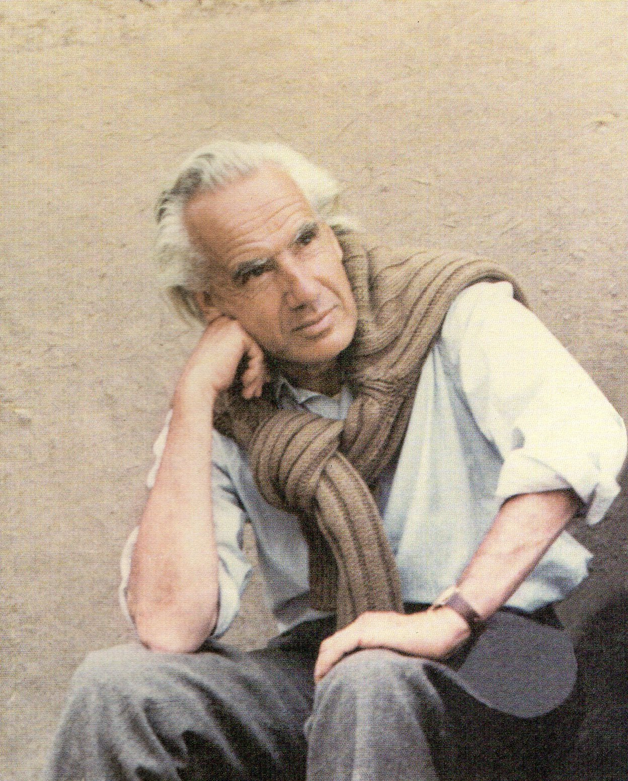 Giancarlo Bartolini Salimbeni verso la fine degli anni Novanta